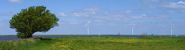 Windmolens Eempolder bij Eemdijk, Windpark Eemmeerdijk